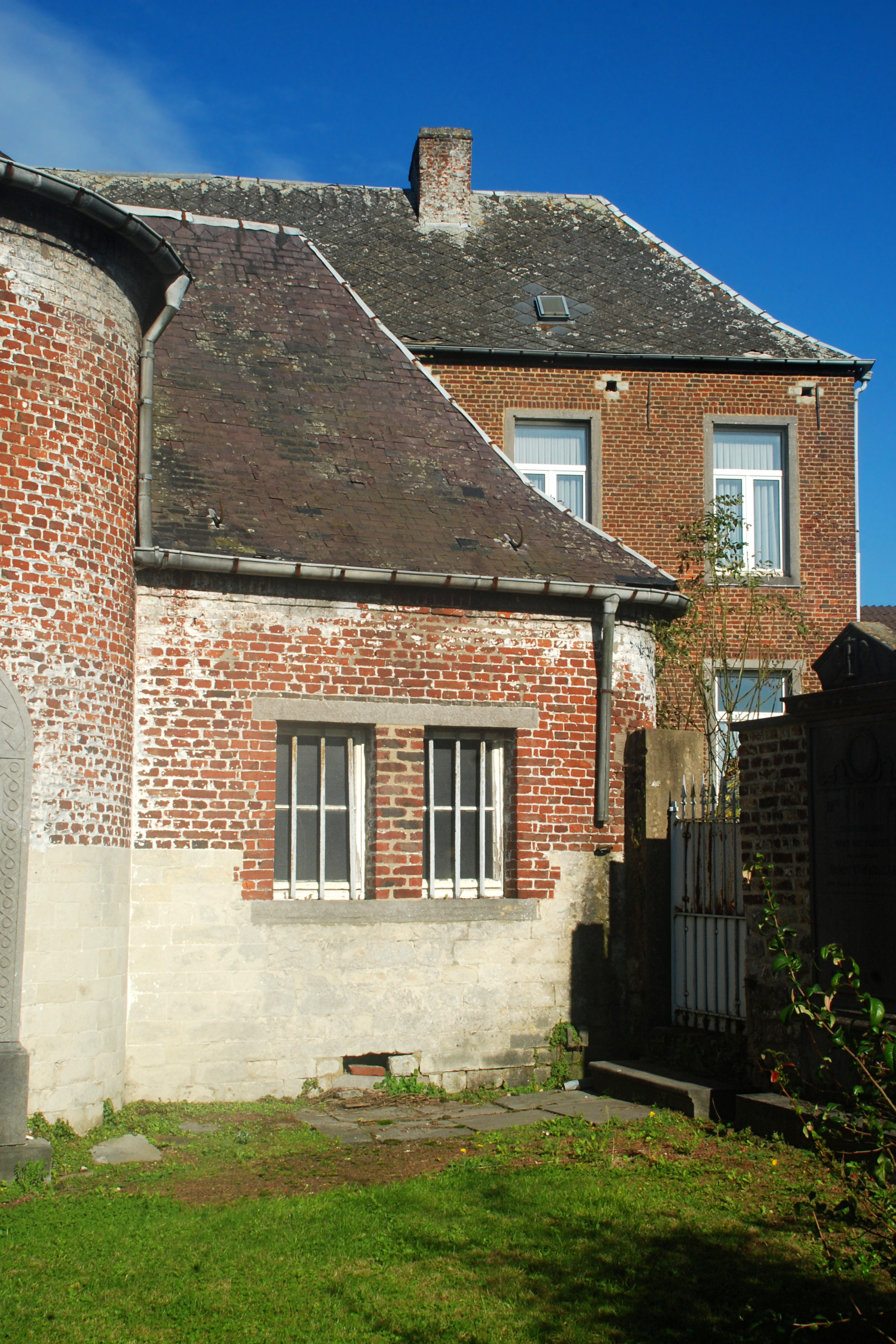 Belgique - Brabant wallon - Nivelles - Eglise Sainte-Marguerite de Thines